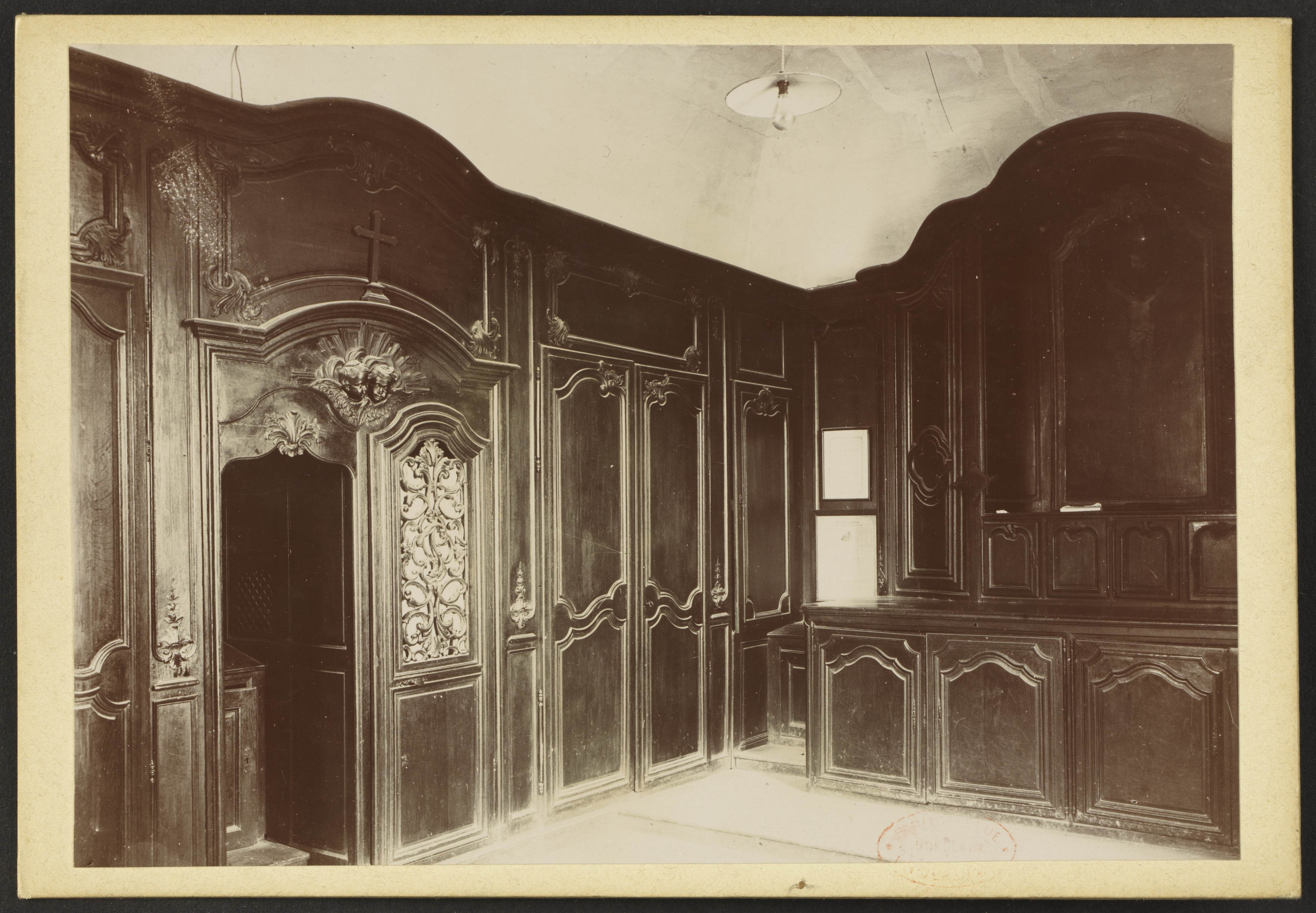 Église Saint-Vincent de Barsac; Boiserie de la sacristie (XVIIIe siècle)